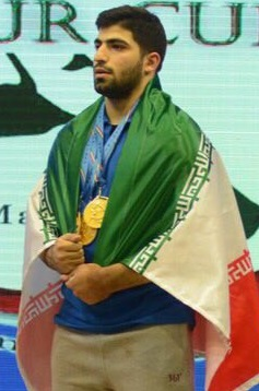 علی مکوندی